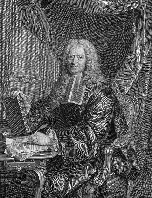 Portrait von Francois Chicoyneau